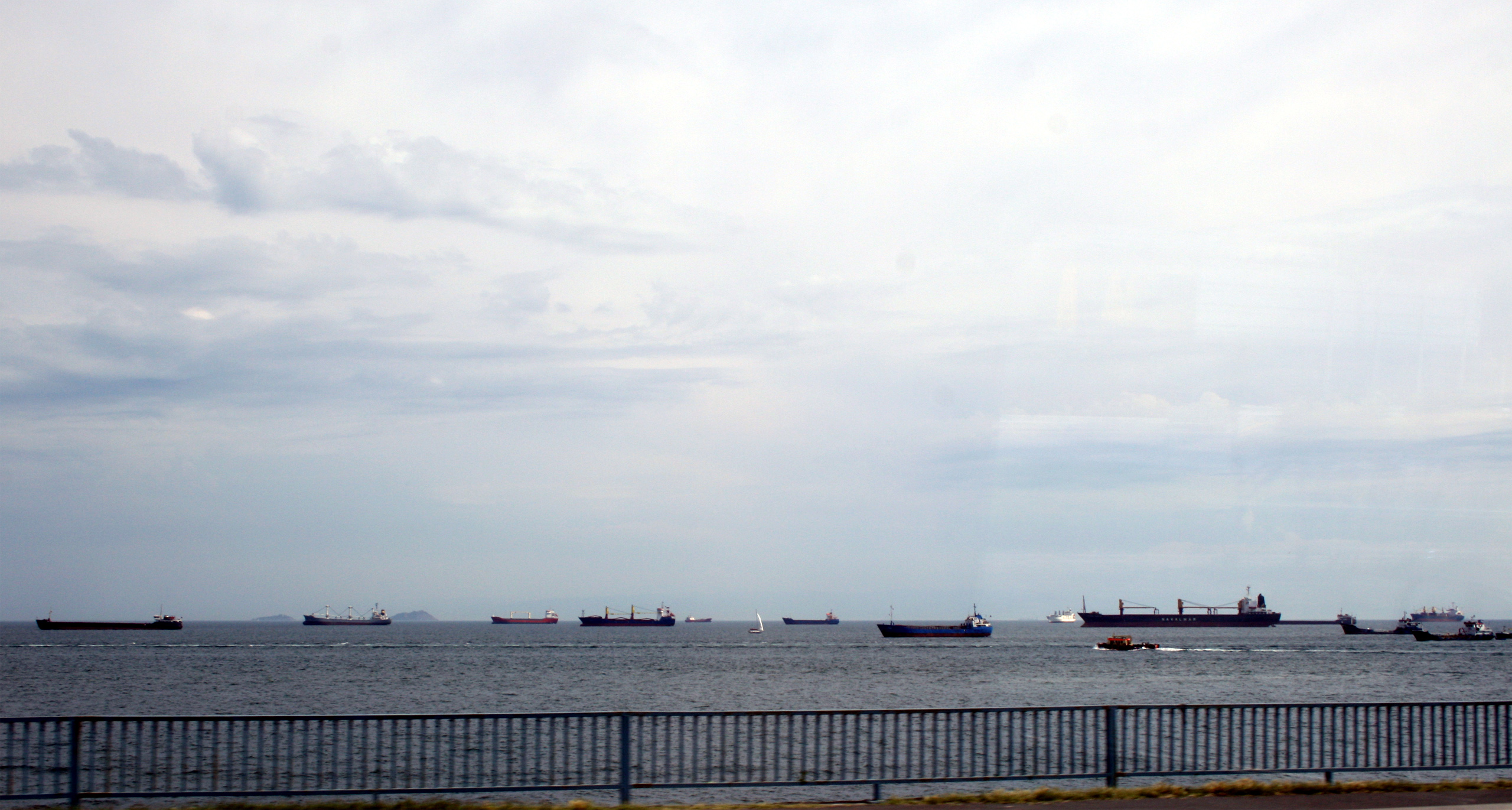 Des bateau, au mouillage dans la mer de Marmara, en attente d'entrée dans le Bosphore